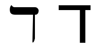 hebrew letter dalet